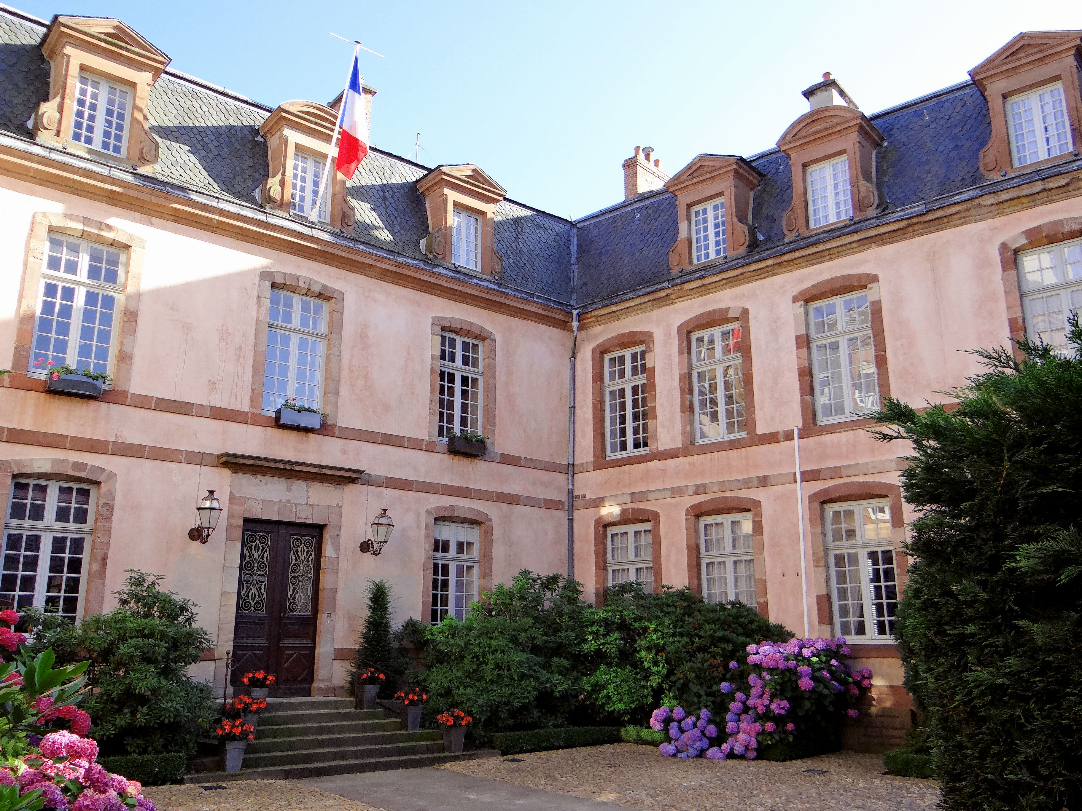 Rodez - Hôtel Le Normant d'Ayssènes - Hôtel construit dans la première moitié du XVIIIe siècle